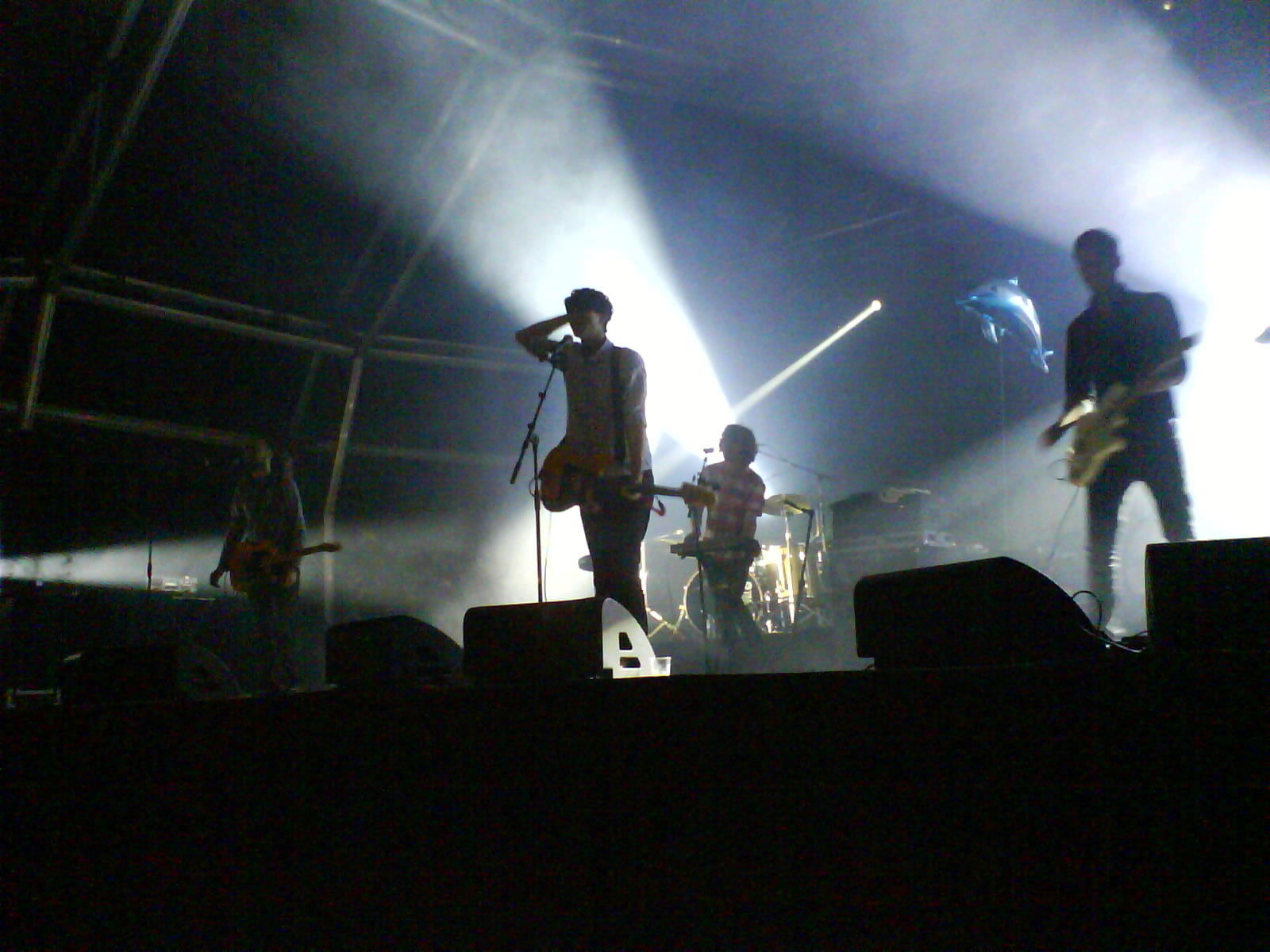 We Are Standard en concierto en la Festa Major de Lleida 2009